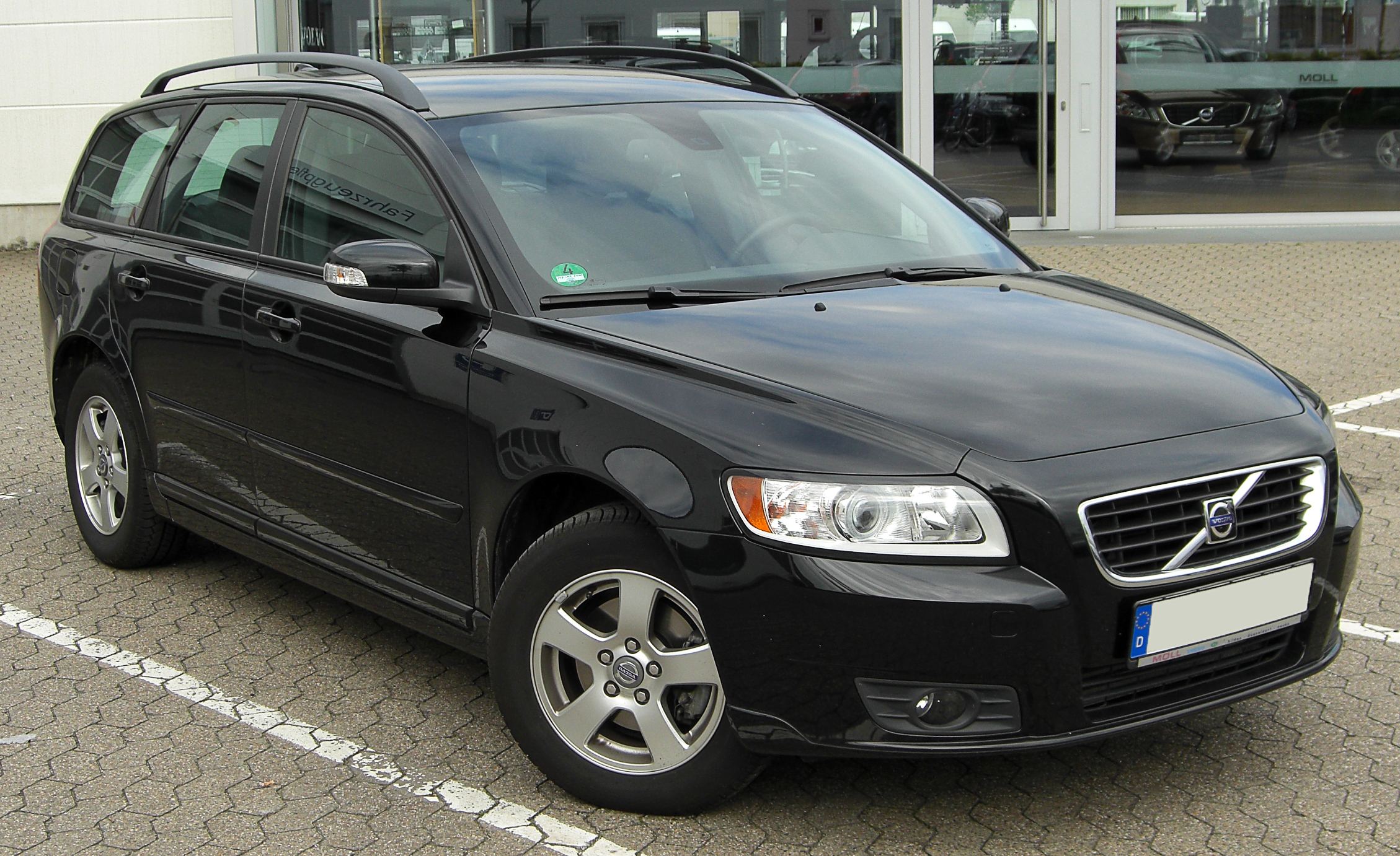 Volvo V50 1.6 D